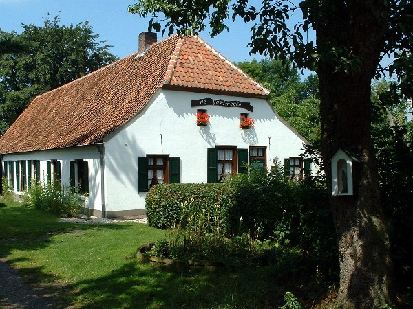 Boerderij de Gortmeule te Horst aan de Maas